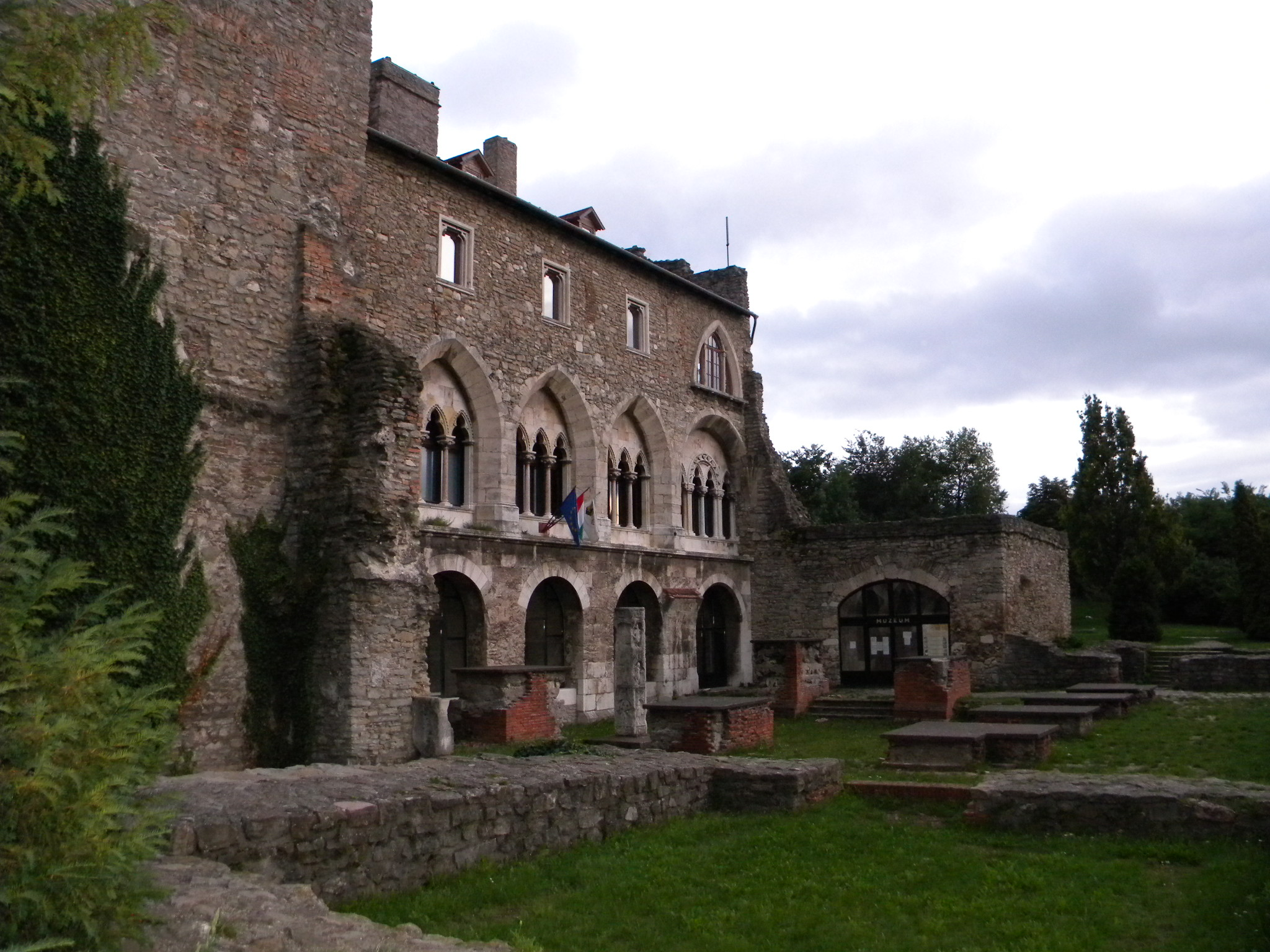 A múzeum a piarista rend gyűjteményéből alakult. Dornyay Béla piarista szerzetes, tanár alapította. A Kuny Domokos Múzuem jelenleg a Tatai várban található.